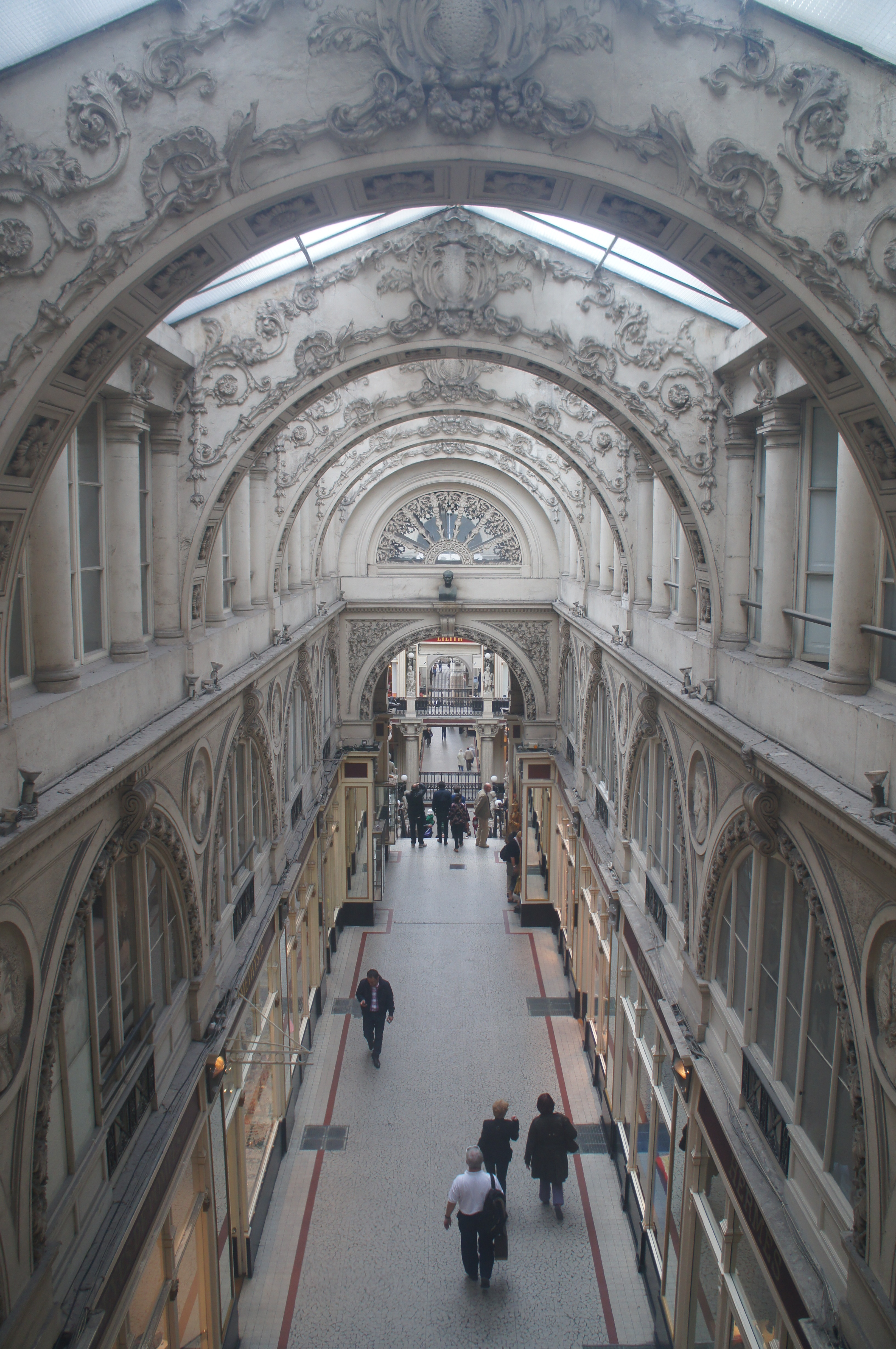 Le passage Pommeraye